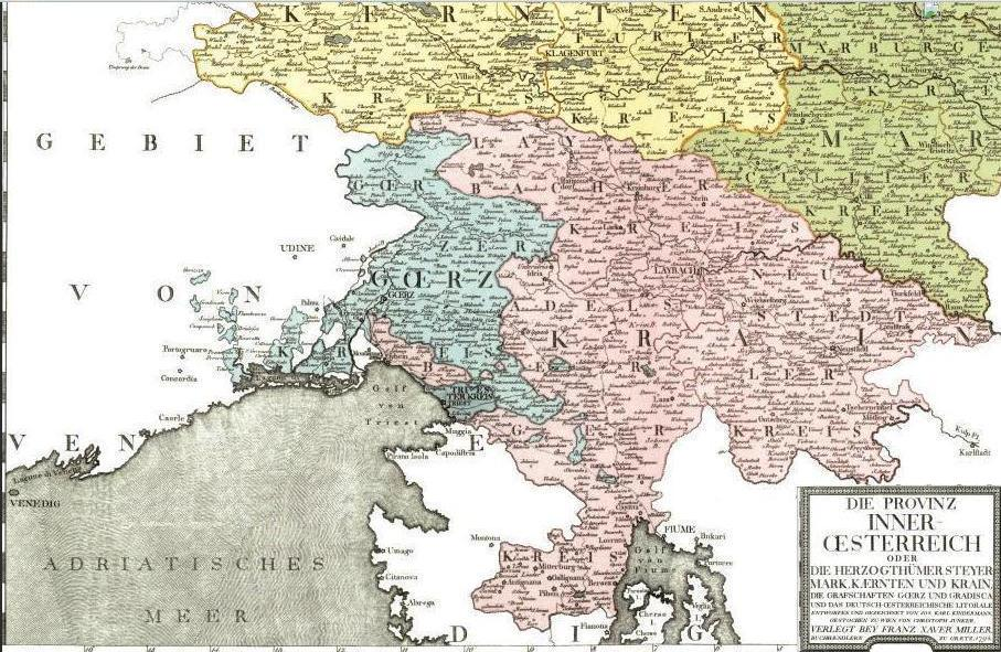 Territori della Carniola e di Gorizia nel 1794 - Immagine derivata da File:Avl Provinz Innerösterreich.jpg caricata su Commons da utente "Akela3" il 19 marzo 2011